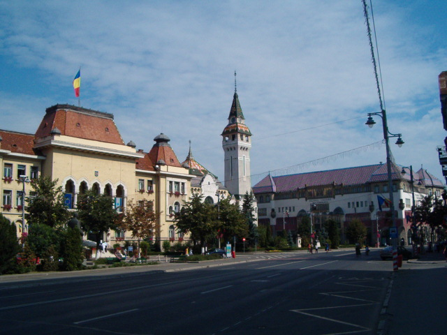 Marosvásárhely-Polgarmesteri hivatal